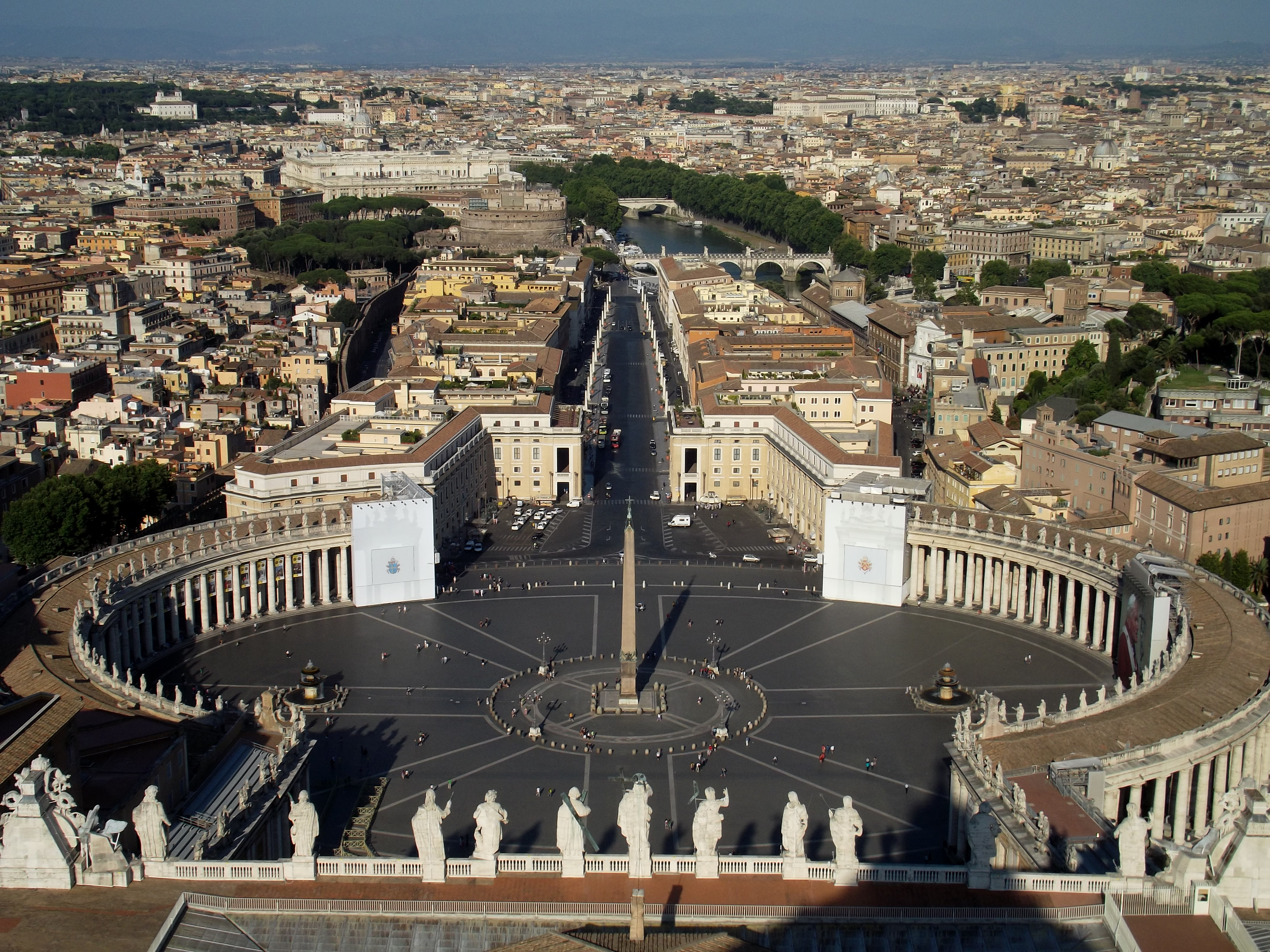 Vista della piazza di San Pietro fotografata dalla cupola